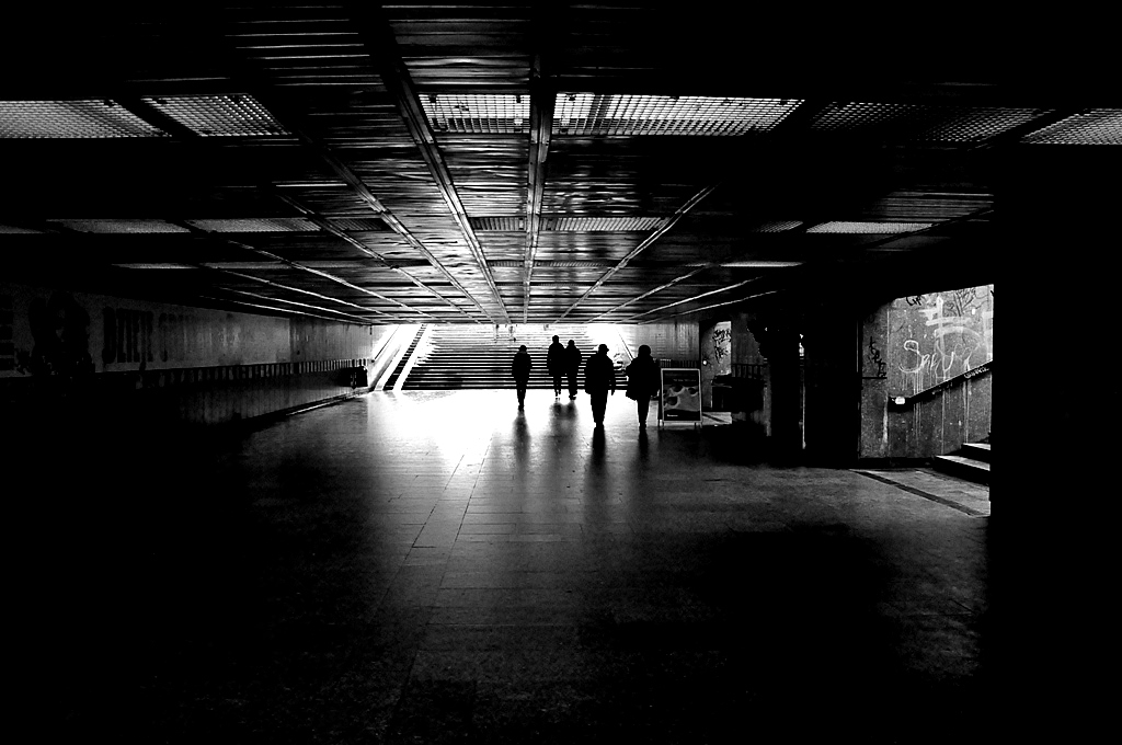 Przejście podziemne, ul. Świdnicka, Wrocław.